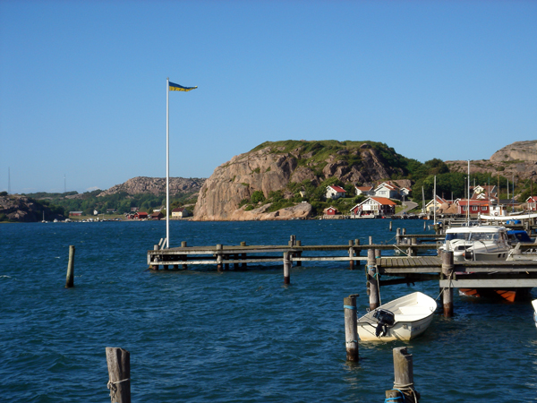 Slottet mot Slotteberget